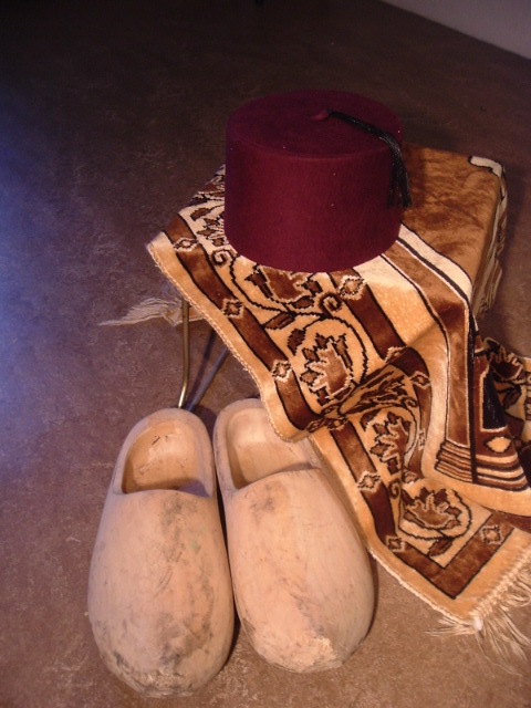 Klompen en een Fez (eigen foto)